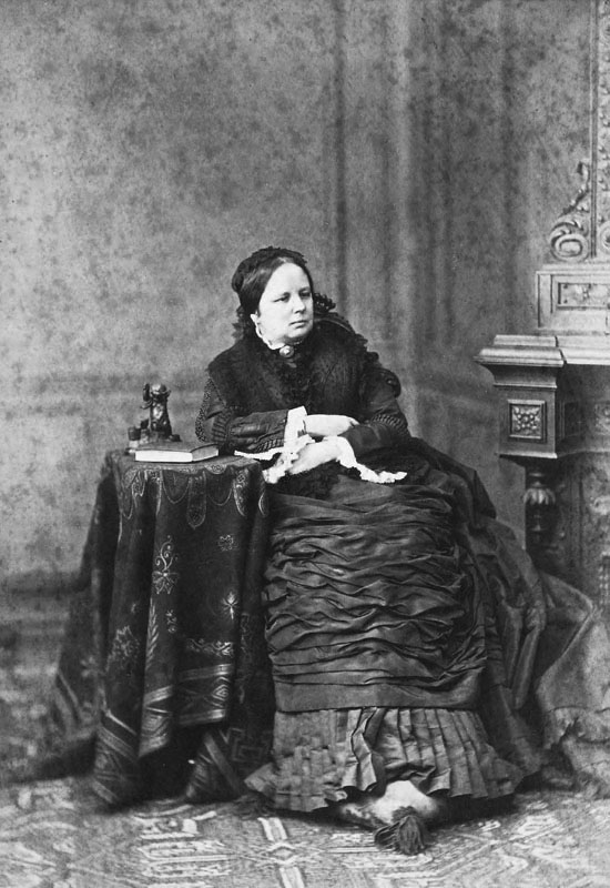 Графиня Софья Михайловна Воронцовой (1825—1879), дочь М.С.Воронцова, с 1844 года жена графа Андрея Павловича Шувалова (1817-1876)